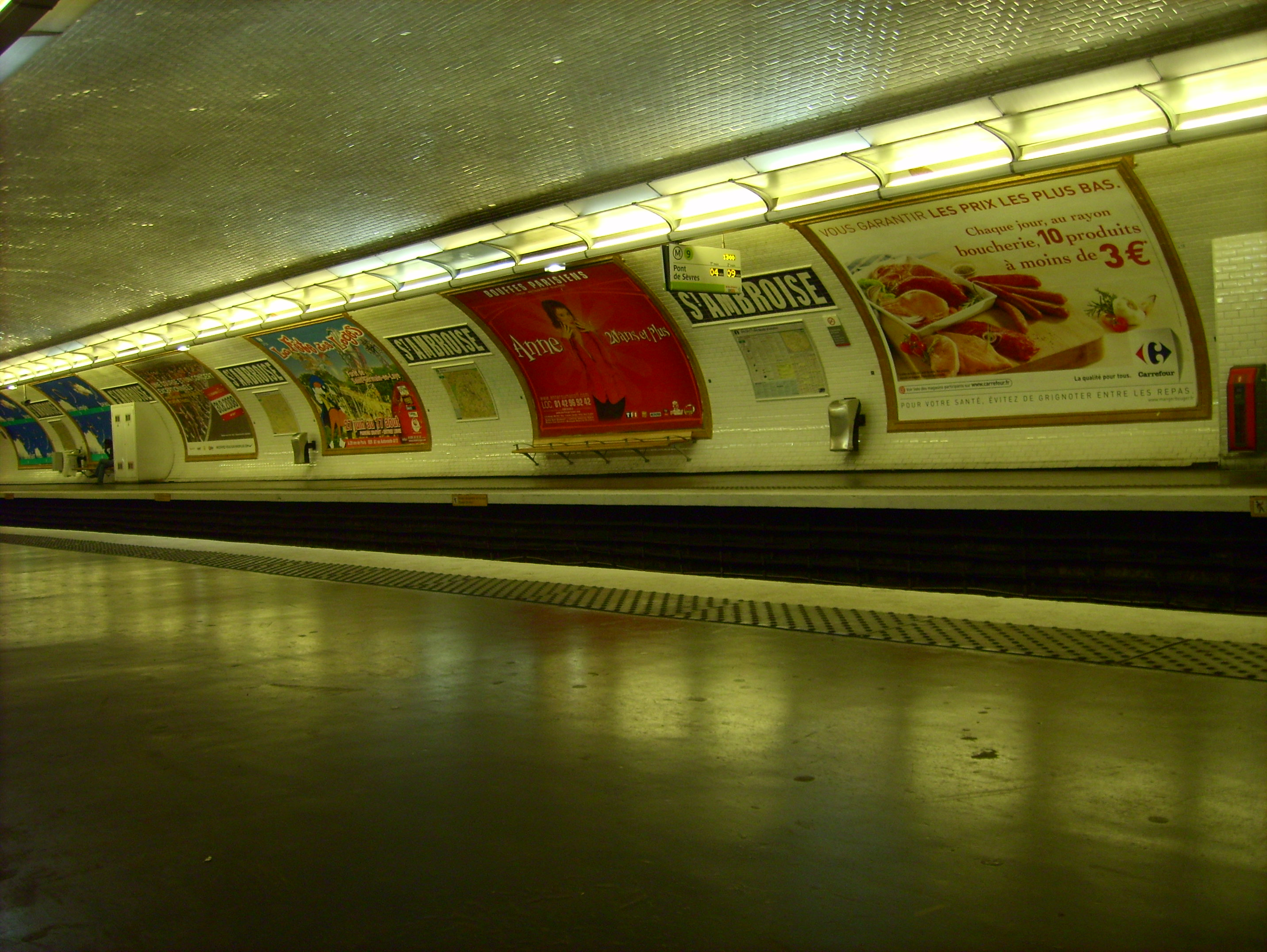 Station du métro de Paris Saint-Ambroise